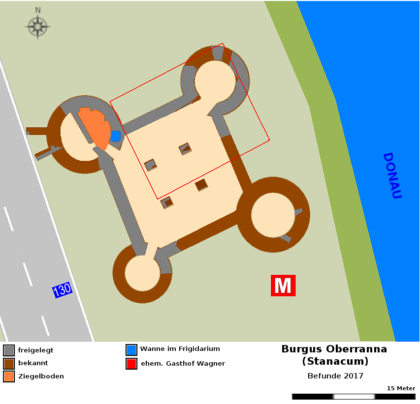 Befundskizze des spätantiken Quadriburgium Oberranna (Stanacum), Engelhartszell (OÖ), Österreich, Grabungsstand 2017.